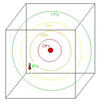 Illustration pour l'assimilation de données (Wikipedia France).